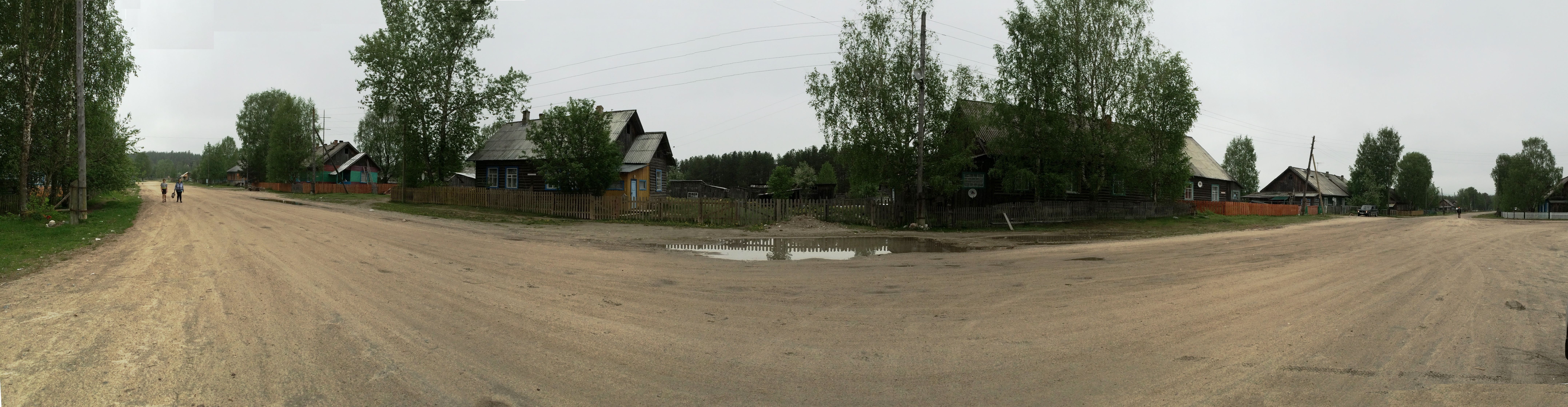 Шалговаара (посёлок)